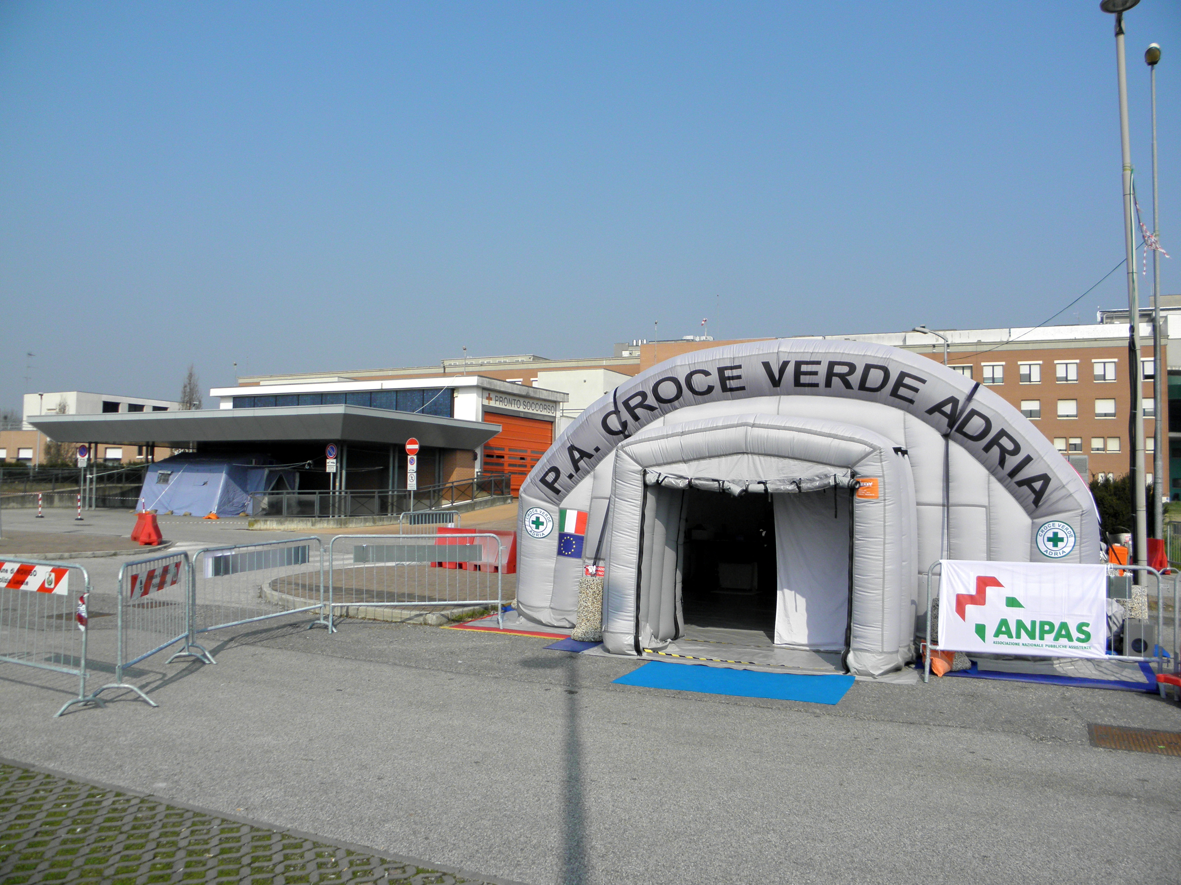 Ospedale Santa Maria della Misericordia di Rovigo, le tende istallate per l'accesso al Pronto Soccorso per fronteggiare l'epidemia di COVID-19 del 2019-2020. (12 marzo 2020)